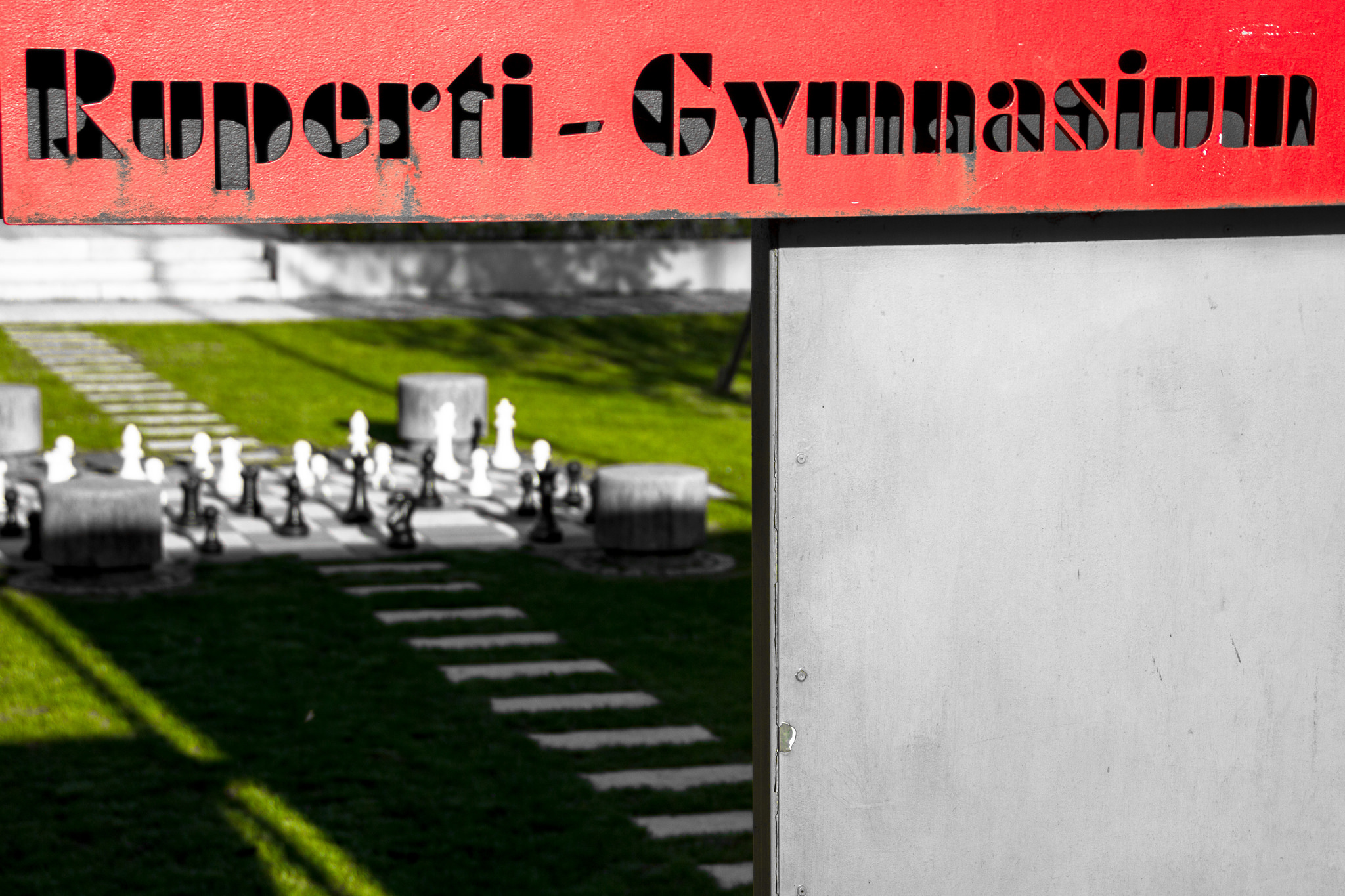 Fotografiert vom Parkplatz des Ruperti-Gymnasiums